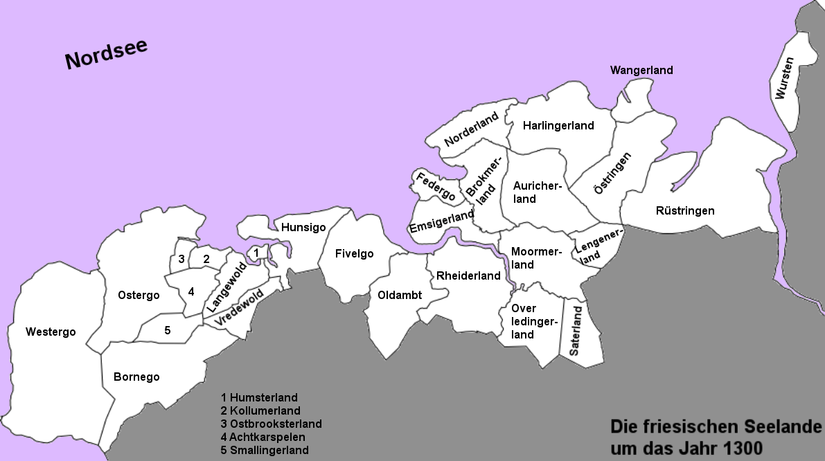 Karte der freien friesischen Seelande (Landesgemeinden) von der Zuiderzee bis zur Weser in den Grenzen um das Jahr 1300. (Karte ohne Inseln.)